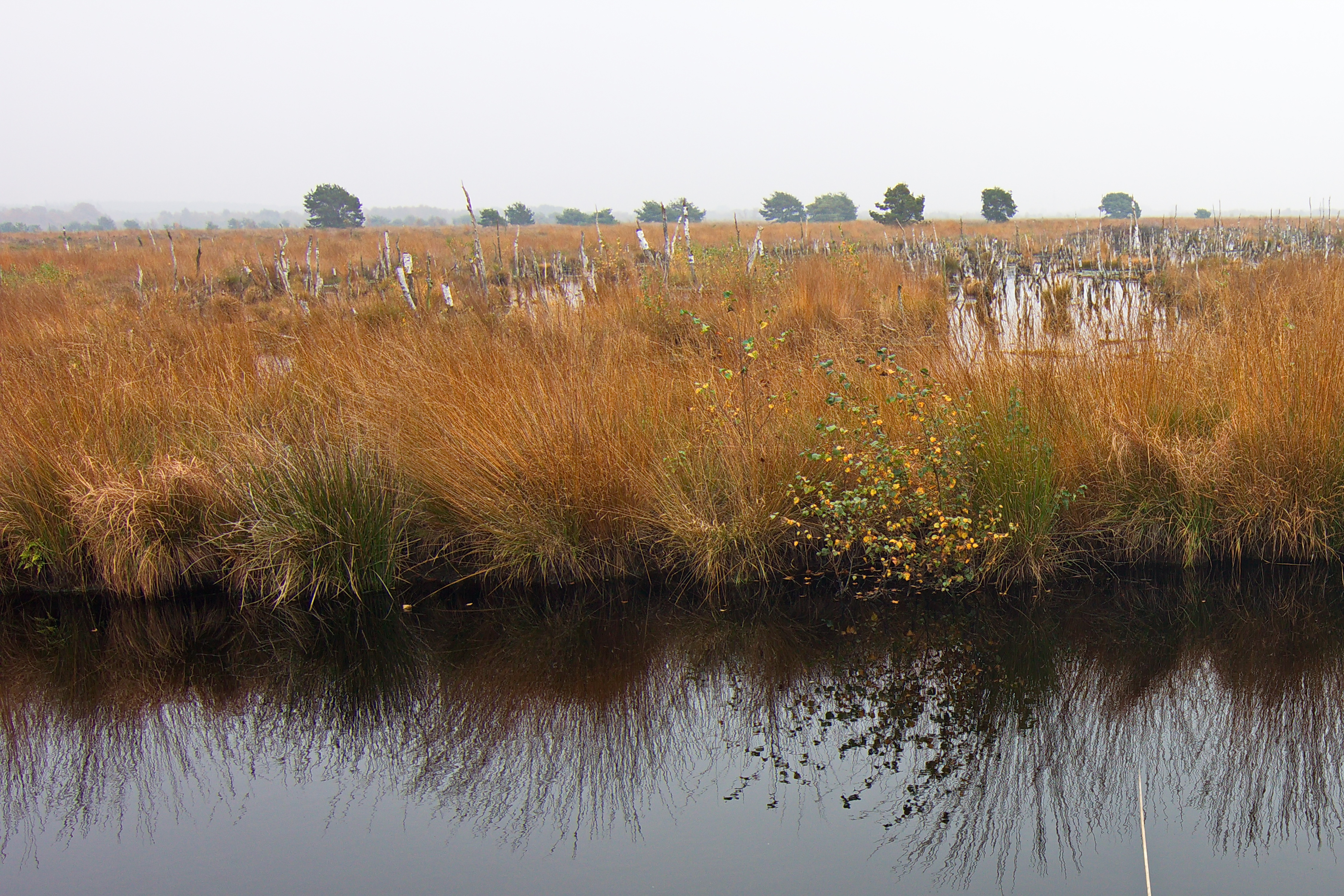 Das Naturschutzgebiet Rehdener Geestmoor ist ein ausgedehntes offenes Hochmoor in der Samtgemeinde Rehden, Landkreis Diepholz, Niedersachsen, Deutschland.